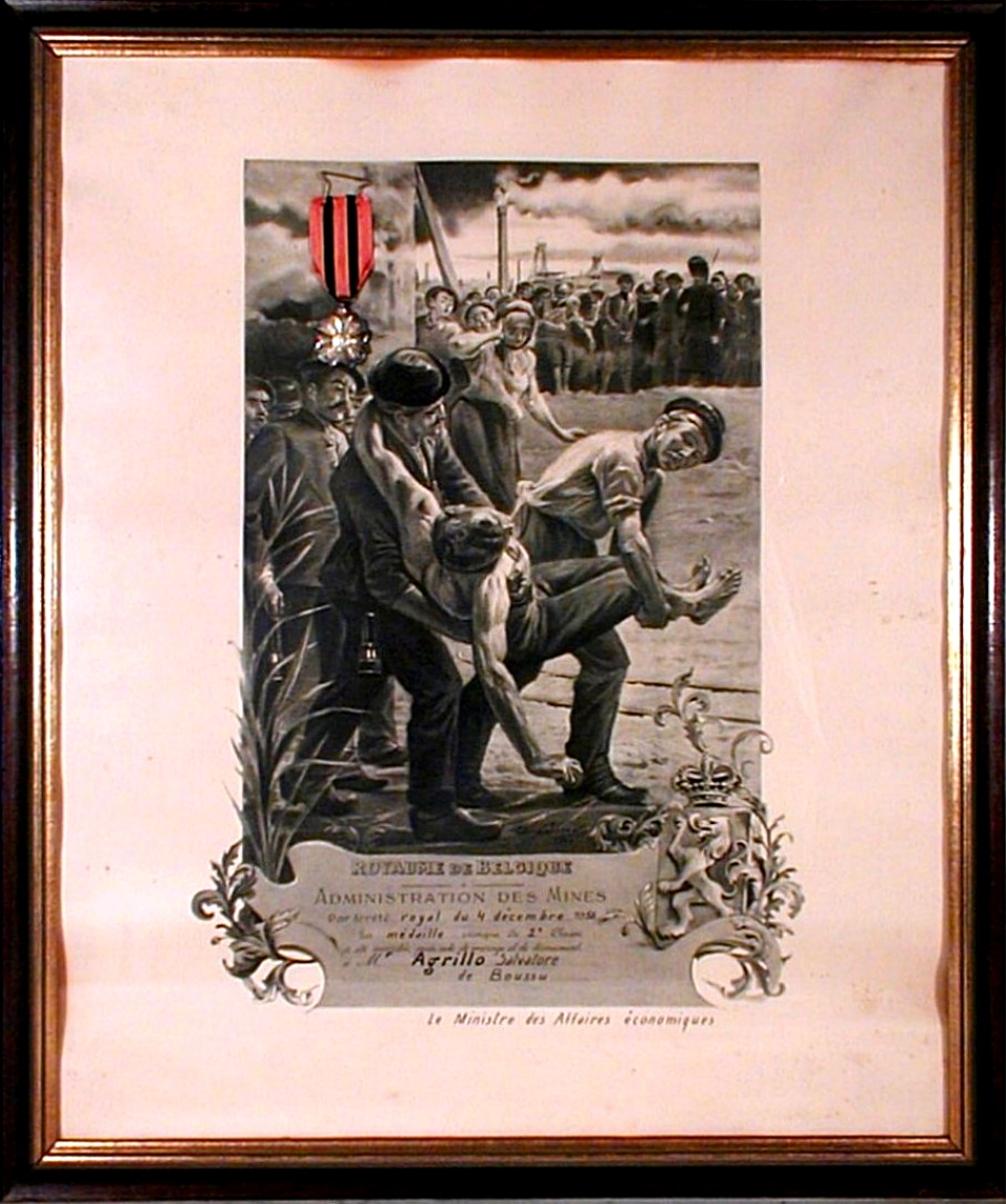 Diplôme Royaume de Belgique remis aux sauveteurs ayants participés à la catastrophe du Bois du Cazier à Marcinelle en 1956